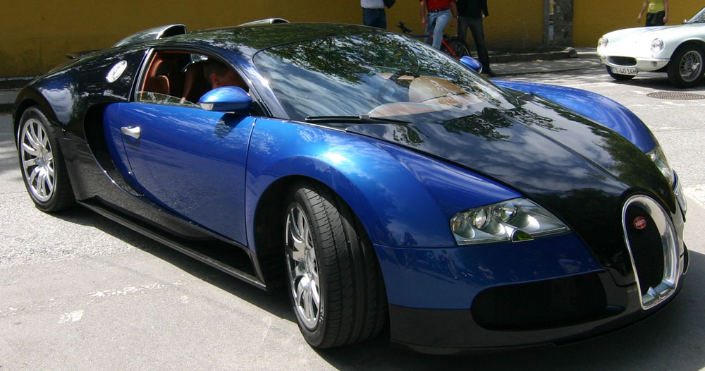 Bugatti Veyron